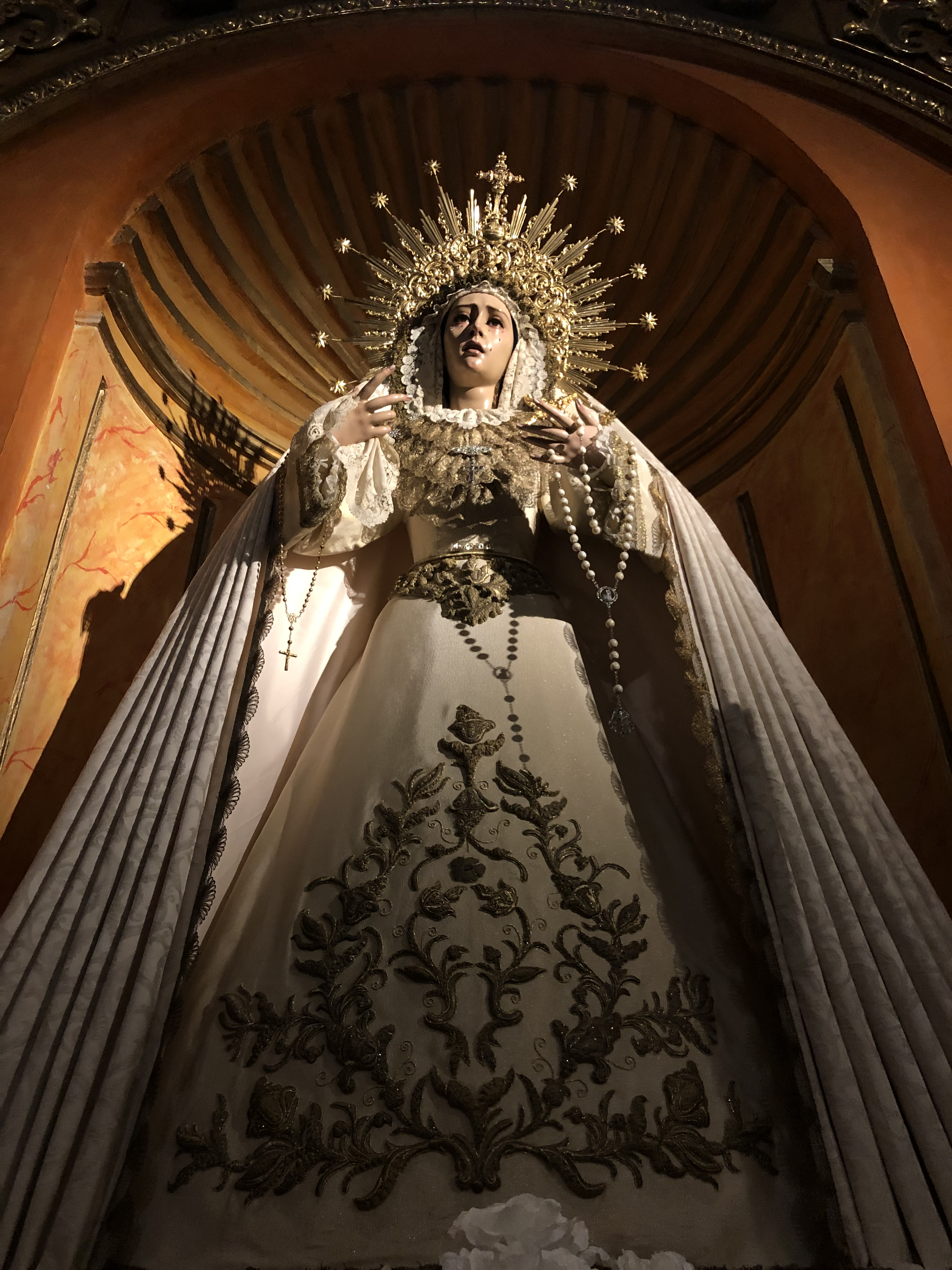 Virgen Mayor Dolor